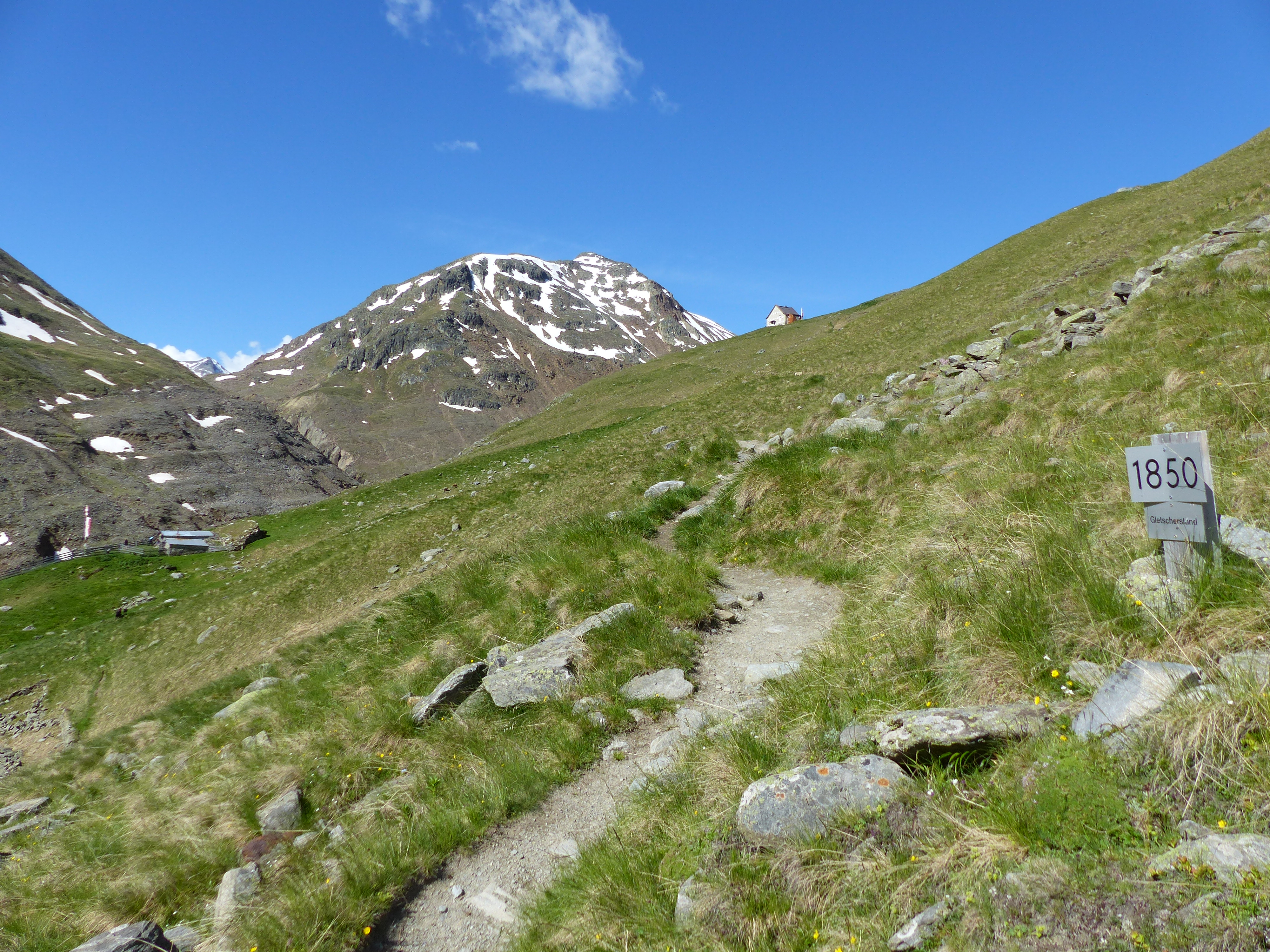 Hochjochhospiz mit Marke am Weg, die das Ende des Hintereisferners im Jahr 1850 im Talboden anzeigt. Links die Rofenberglam